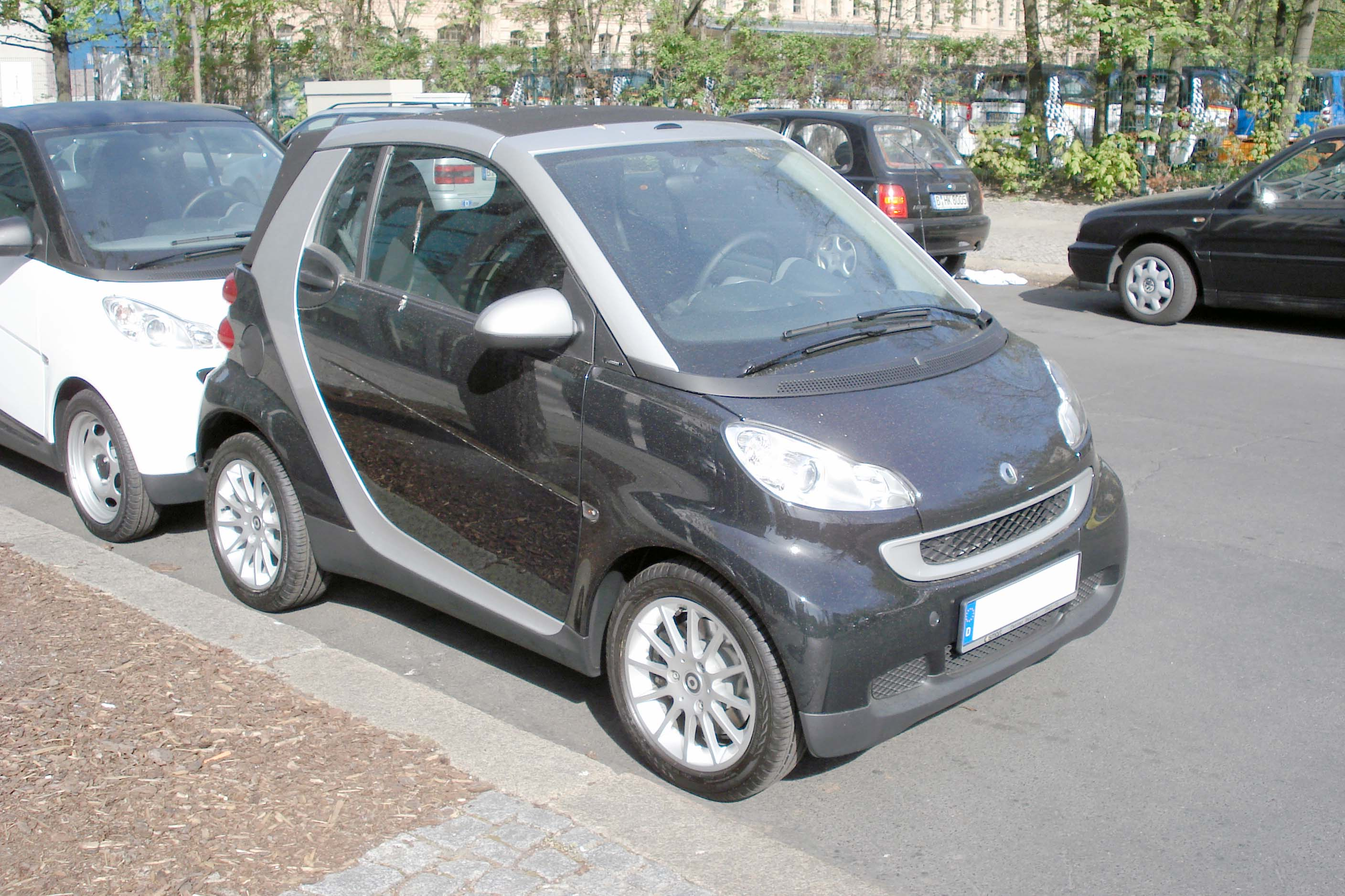 2nd generation Smart